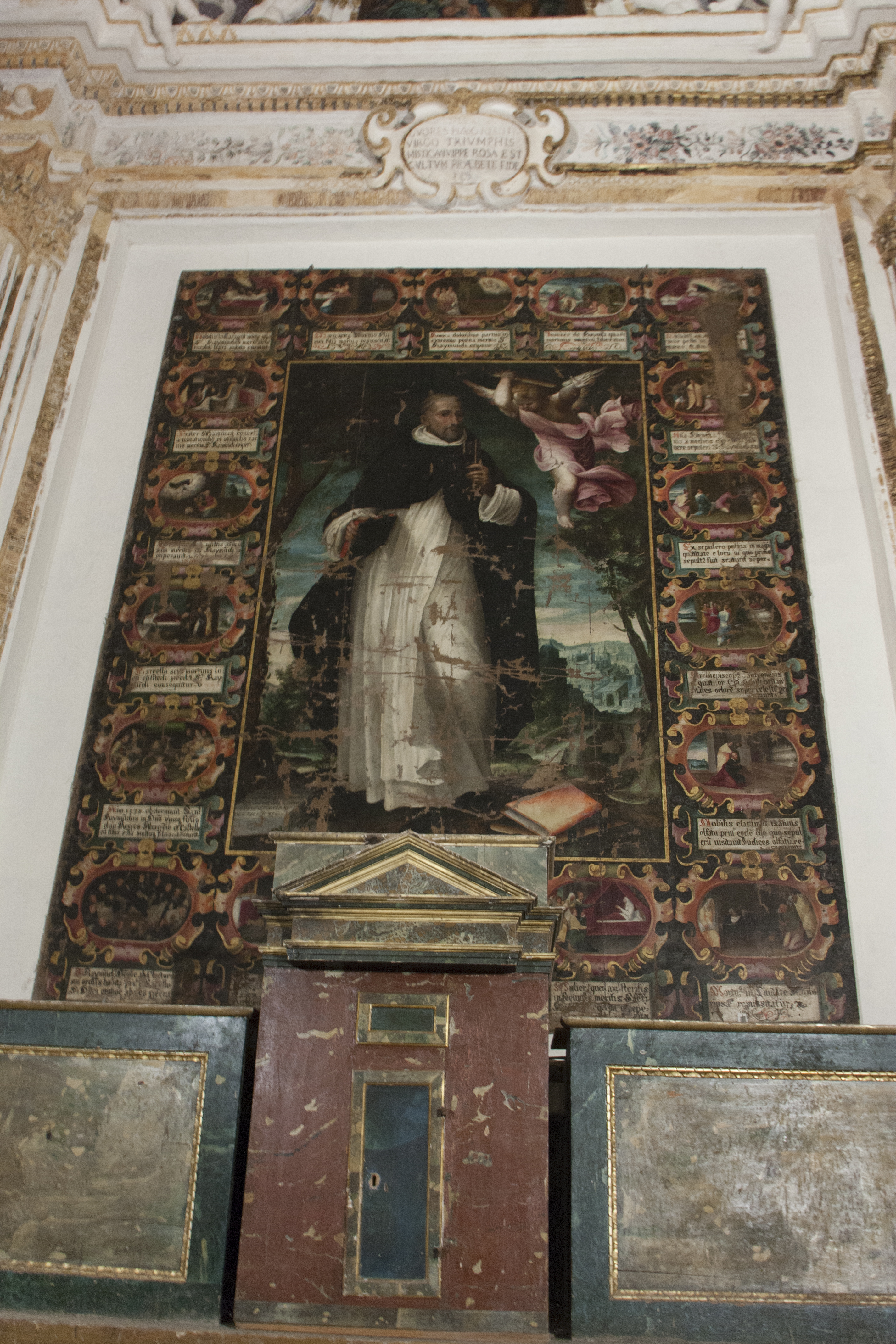 San Raimondo da Penafort - Vito Carrera 1602 cm 356x281 olio su tela presso la Cappella del SS. Rosario